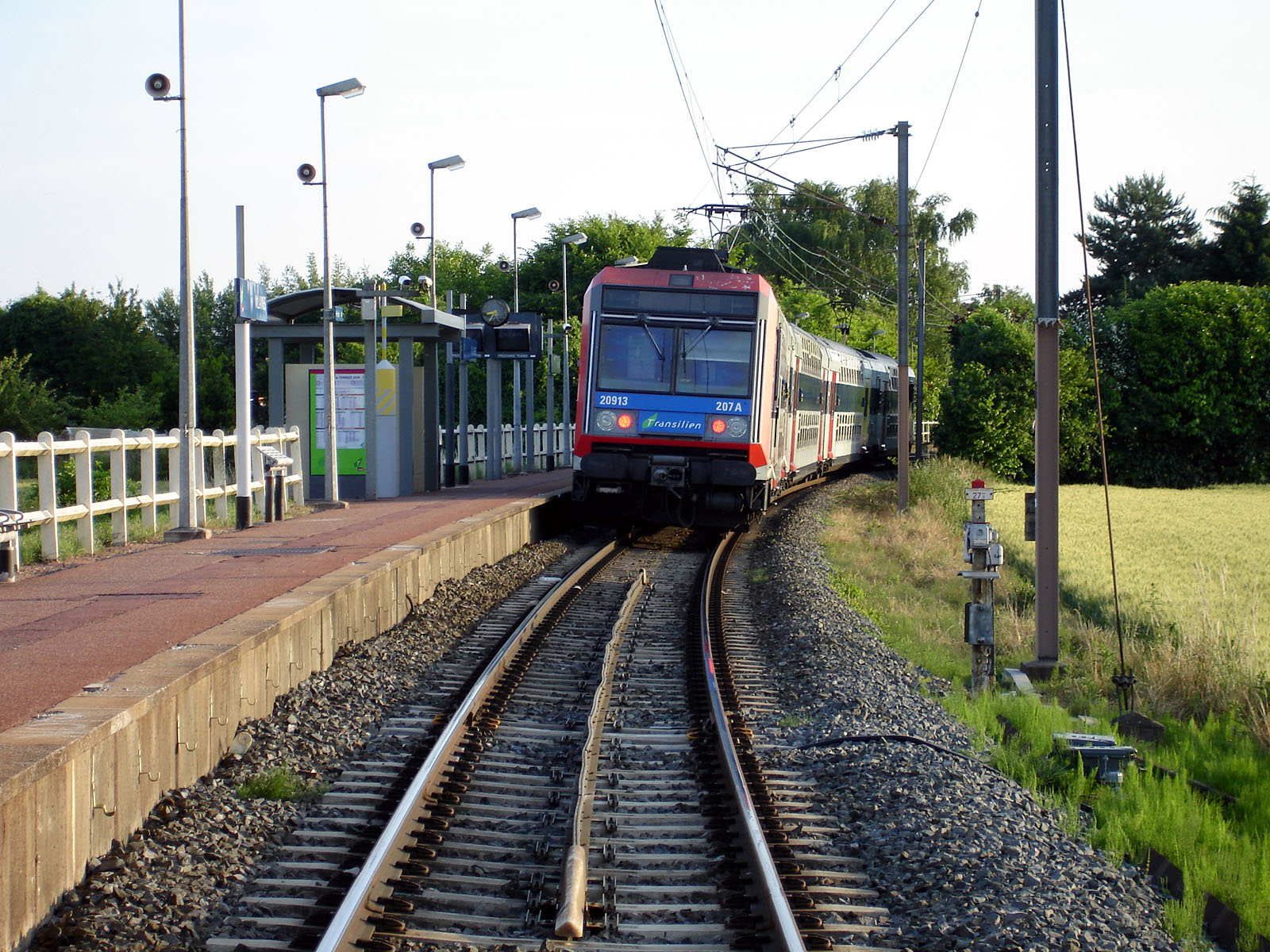 La gare de Villaines, Val-d'Oise, France.